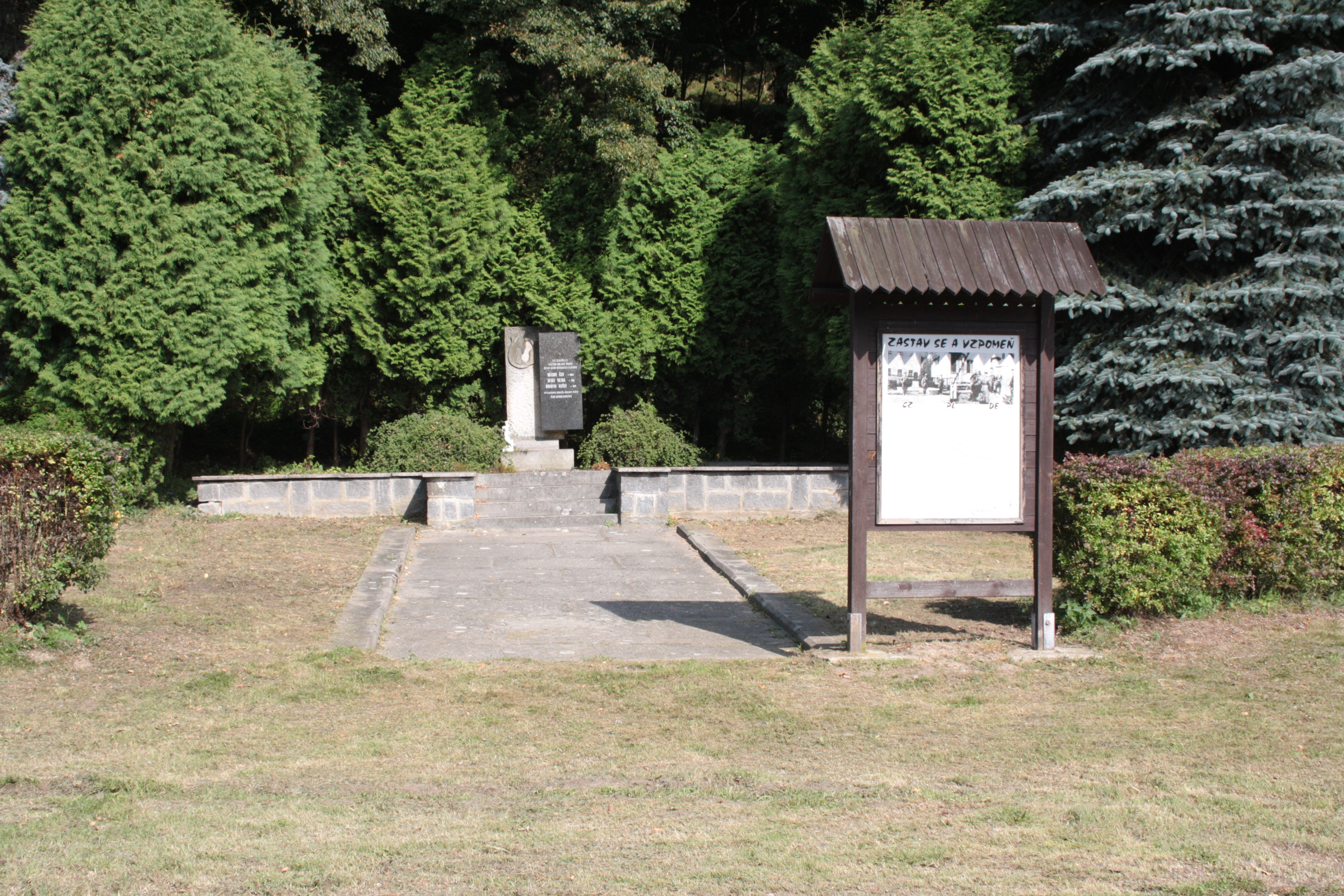 This photograph was taken with a DSLR from WMCZ's Camera grant. Celkový pohled na pomník Stráže obrany státu v Srbské.